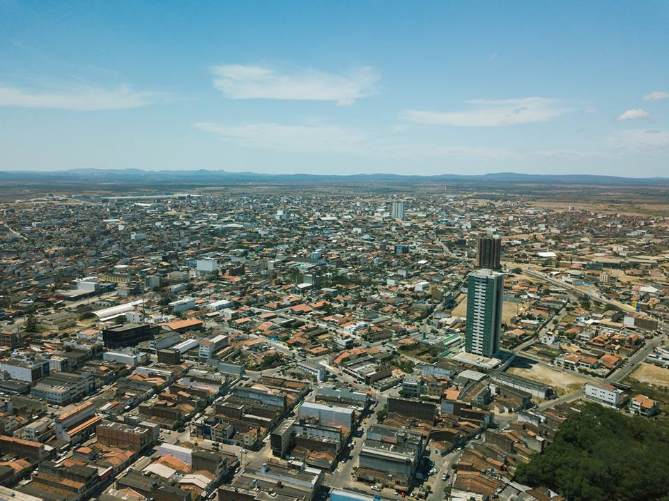 Foto que mostra a sede do município em quase sua totalidade, com exceção da parte oeste da cidade.